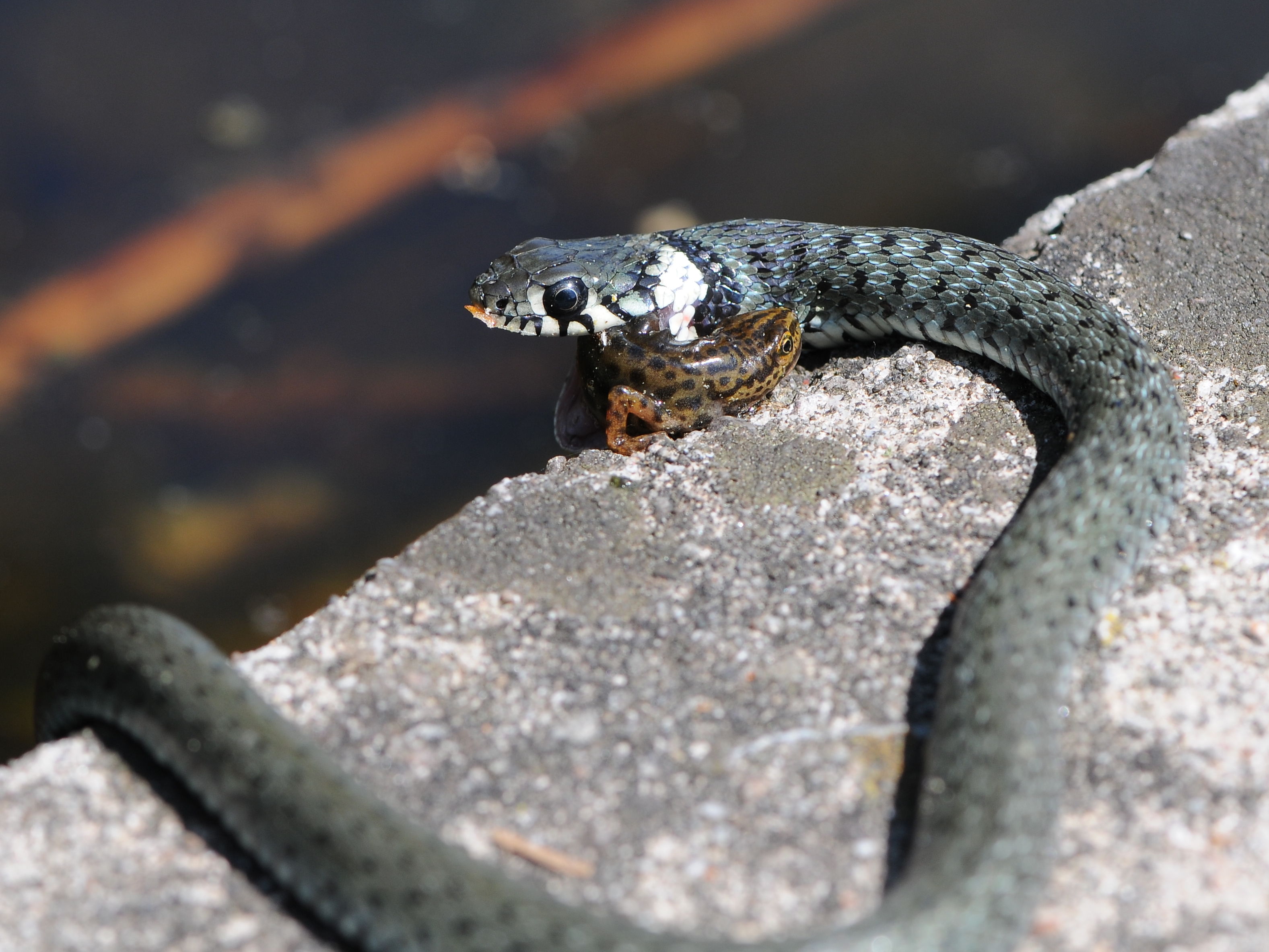 Natrix natrix